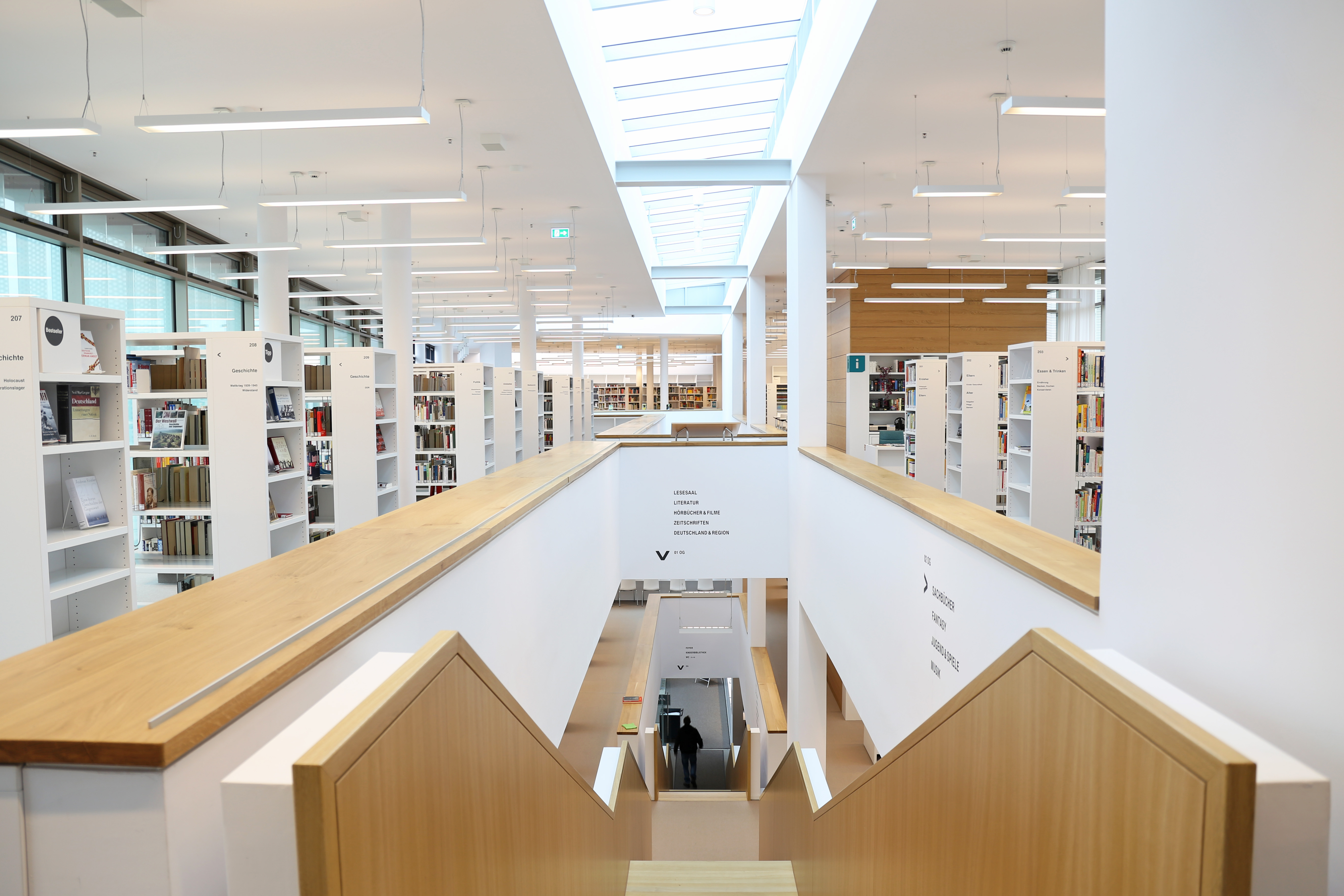 Stadtbibliothek Nordhausen, Blick vom 2. Obergeschoß